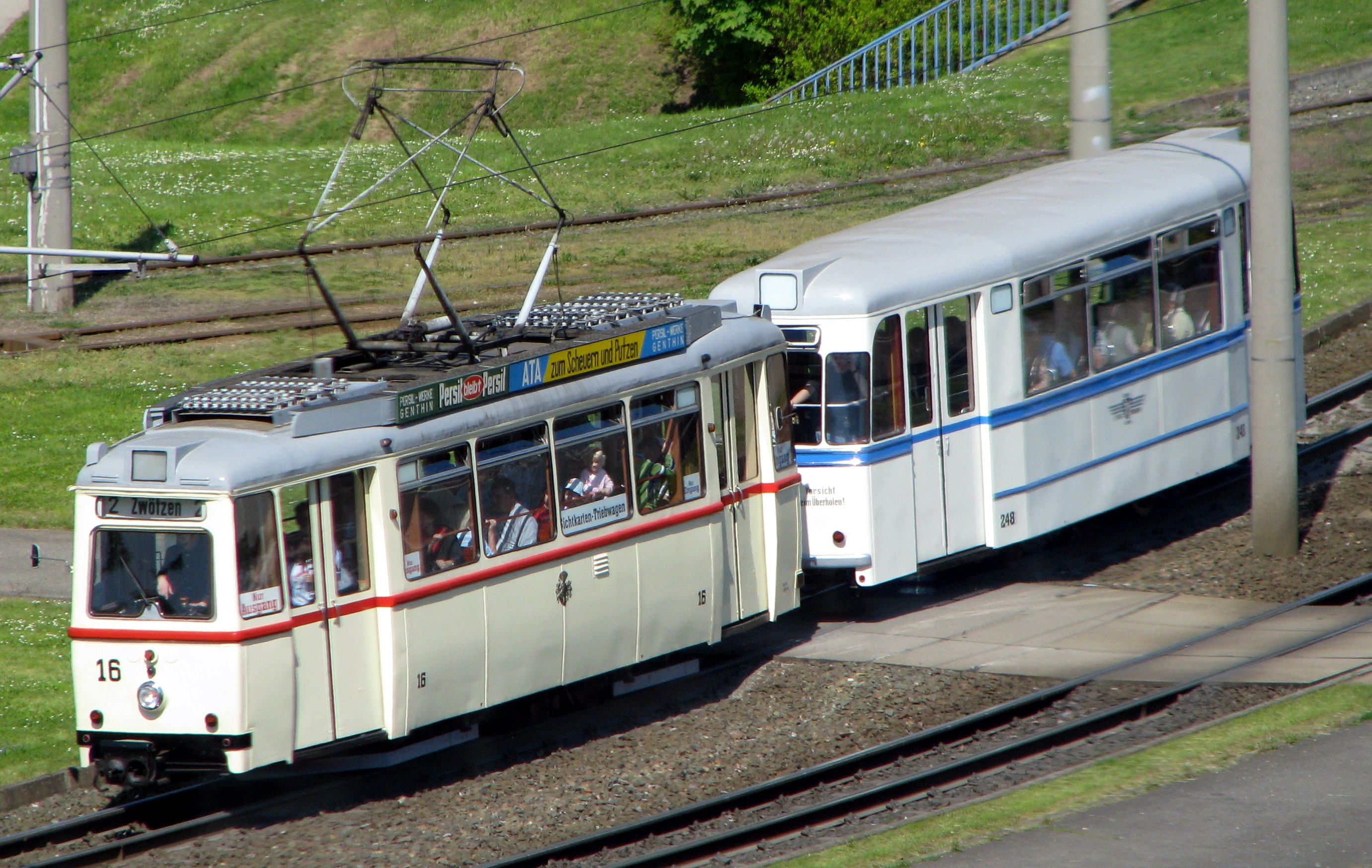 Lowa-Triebwagen Nr. 16 (Baujahr 1955) mit dem Gotha-Beiwagen Nr. 248 (Baujahr 1959)